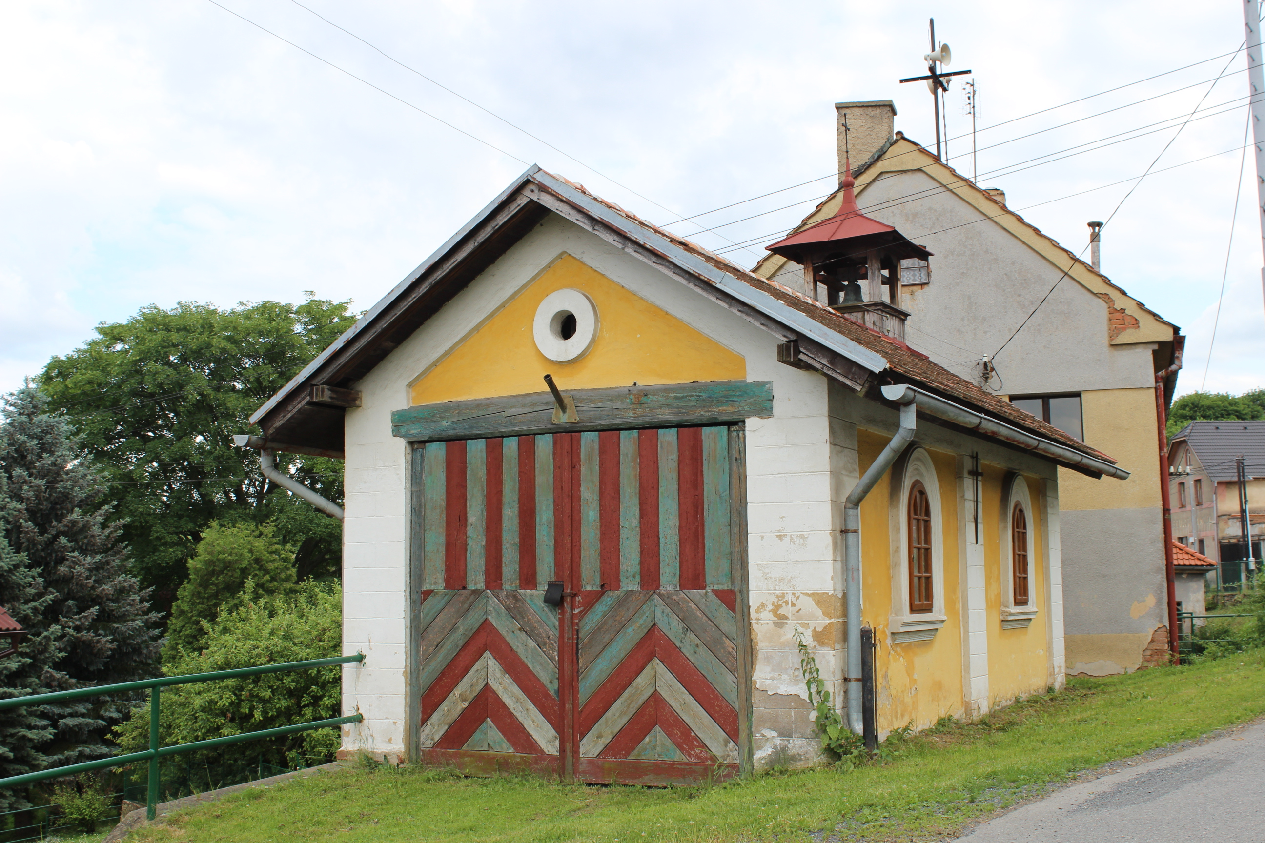 Kaplička v Lašovicích.